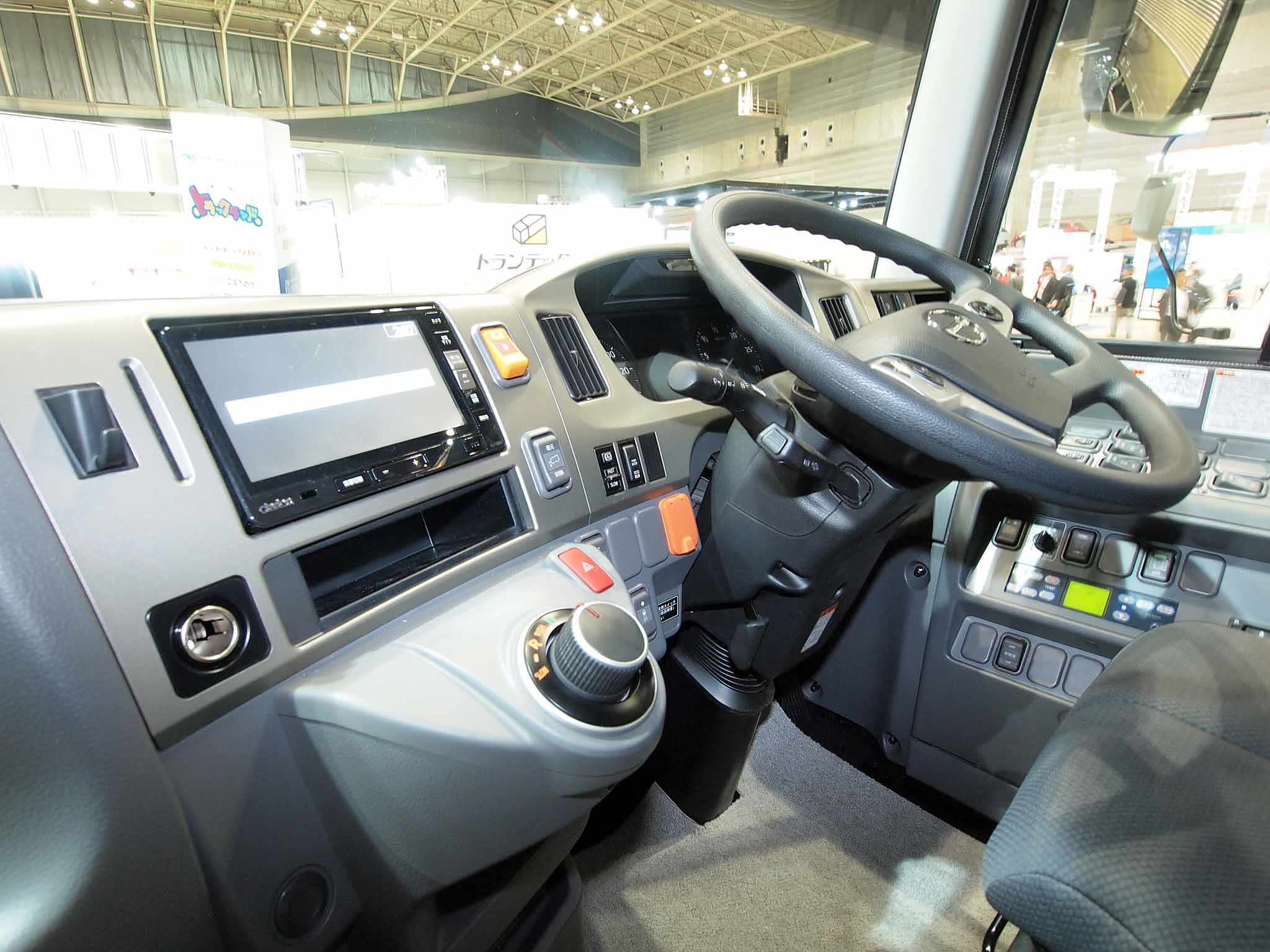 日野・セレガHD-Sの運転席を左から望む。シフトレバーがダイヤル式セレクターに改められたため、シフトアップ／ダウン指令レバーとして左側に2本目のコラムレバーが追加されている。